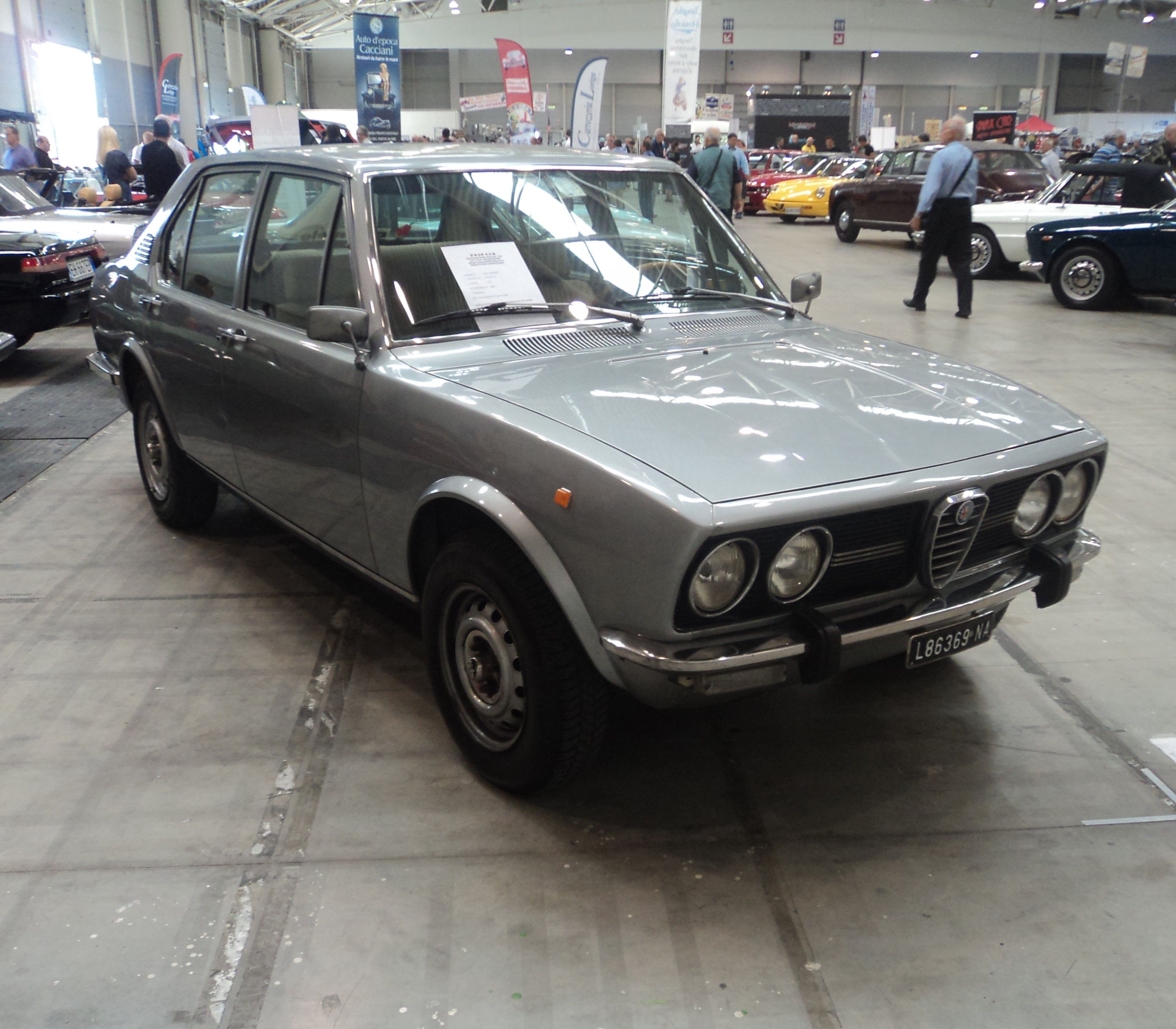 Fuoriserie 2014